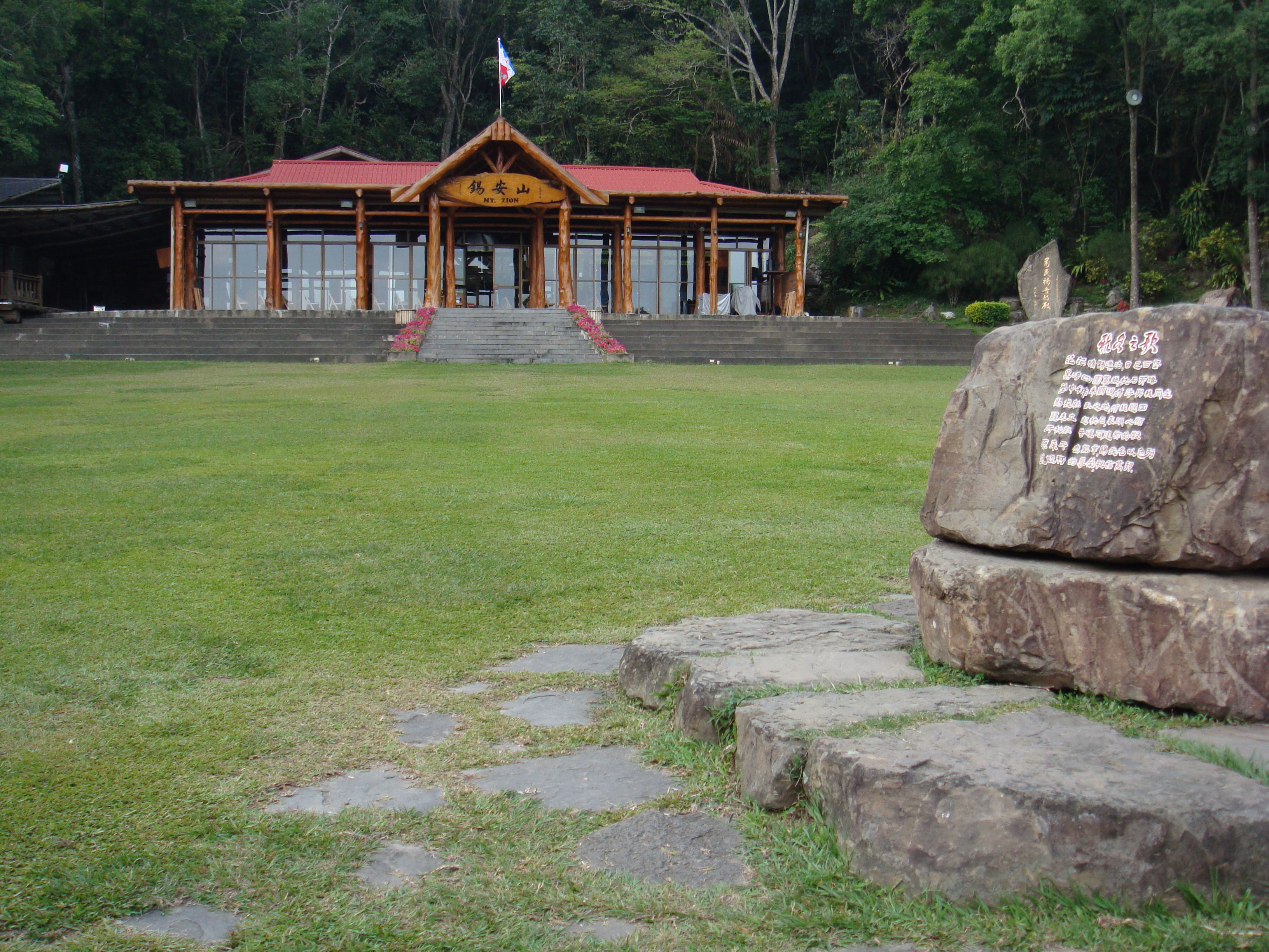 中文（台灣）: 台灣高雄甲仙鄉小林村雙連崛錫安山聖殿